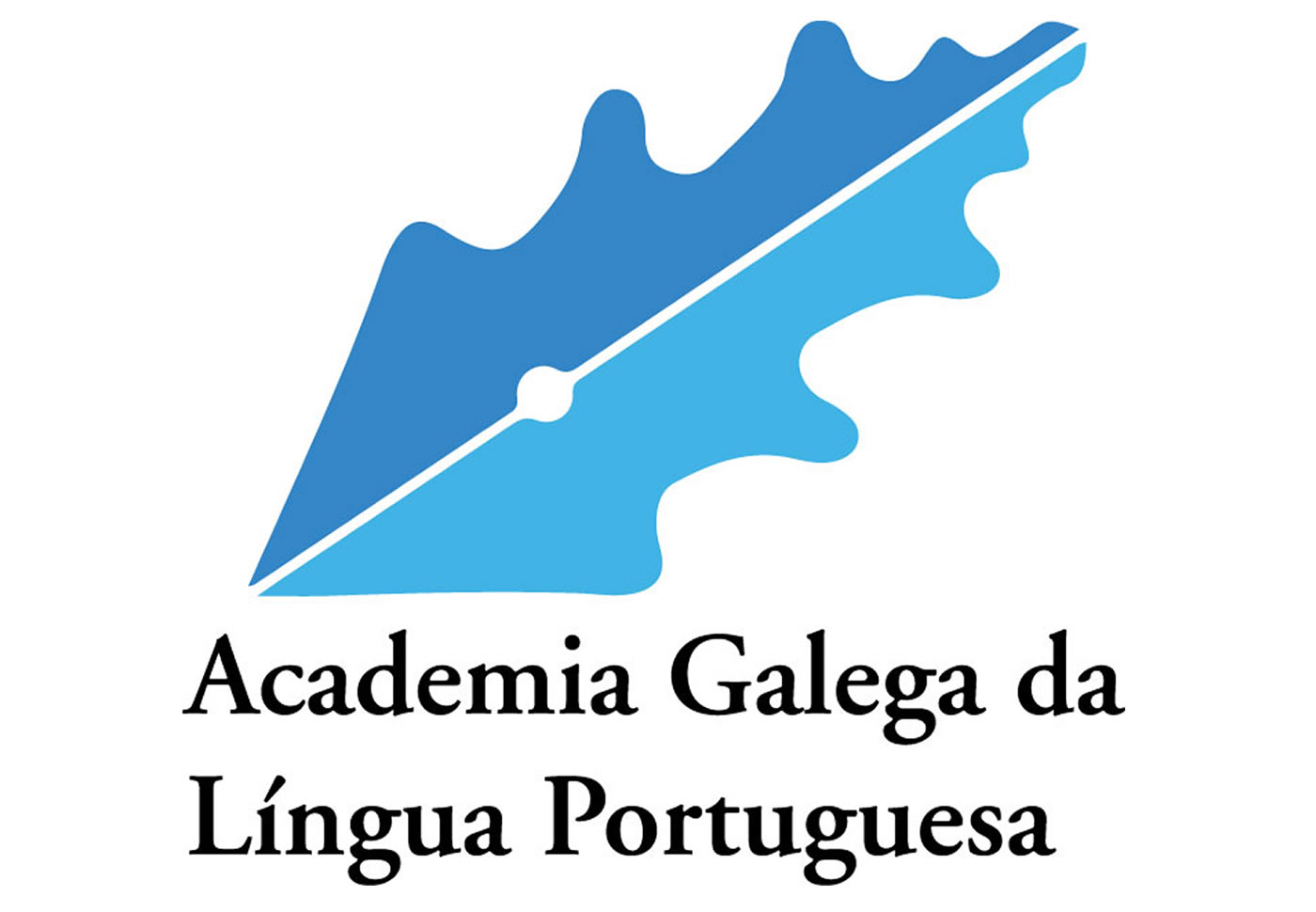 Logótipo da AGLP